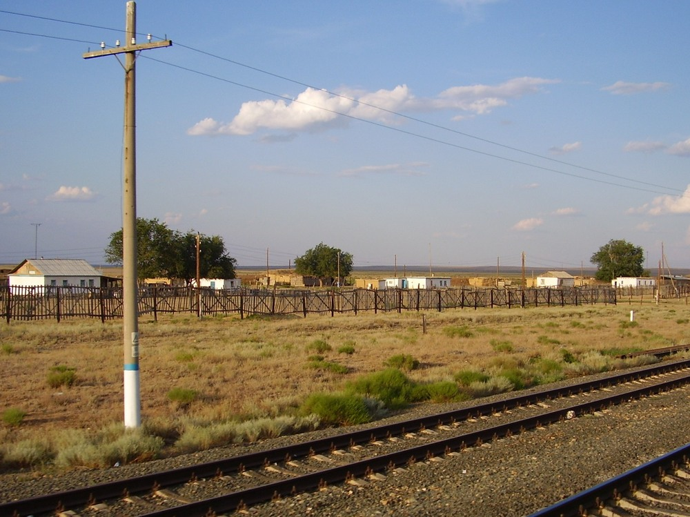 Railway substation in a southeast of the Aqtöbe province of Kazakhstan. Полустанок на юго-востоке Актюбинской области Казахстана.